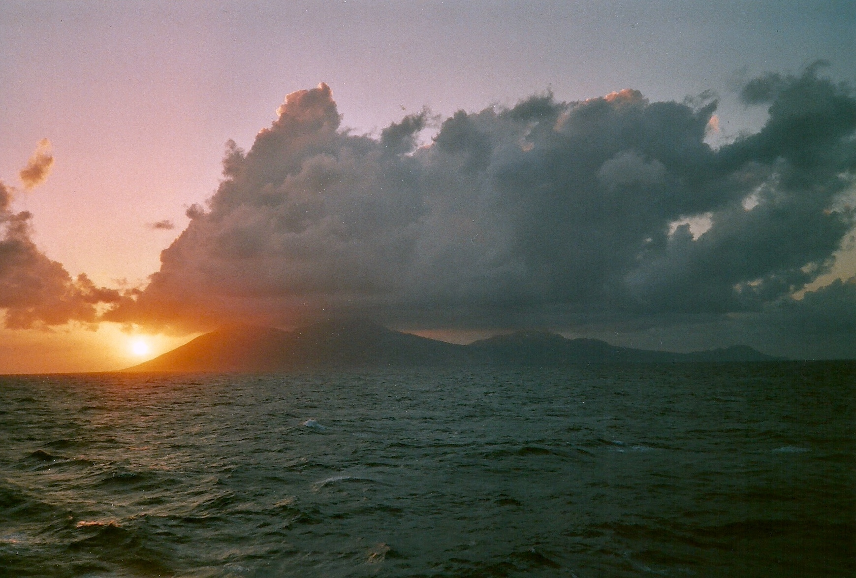 Guadelupe Passage MS Cielo del Canada